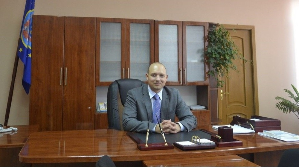 Егор Русский в рабочем кабинете, г.Лутугино ЛНР 2014 год